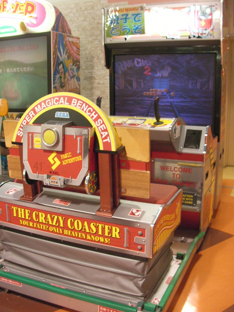 レールチェイス2 オリジナル画像